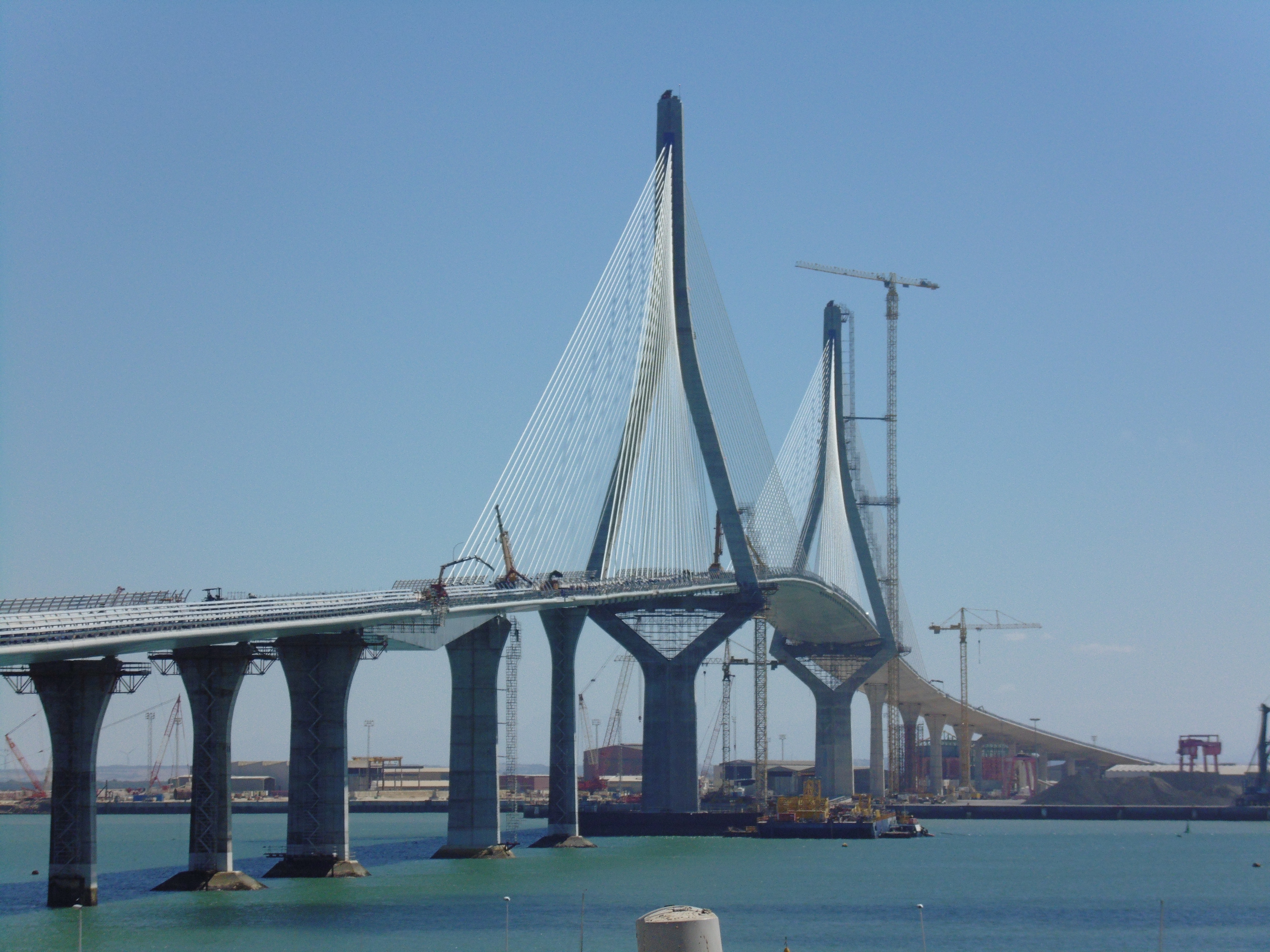 Vista del puente de la Constitución de 1812, en Cádiz.